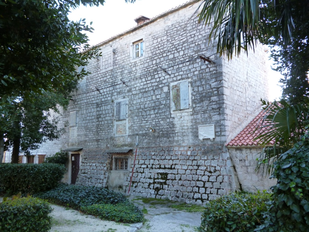 Kaštel obitelji Rosani u Kaštel Lukšiću